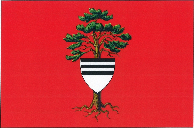 vlajka, Týniště nad Orlicí, okres Rychnov nad Kněžnou